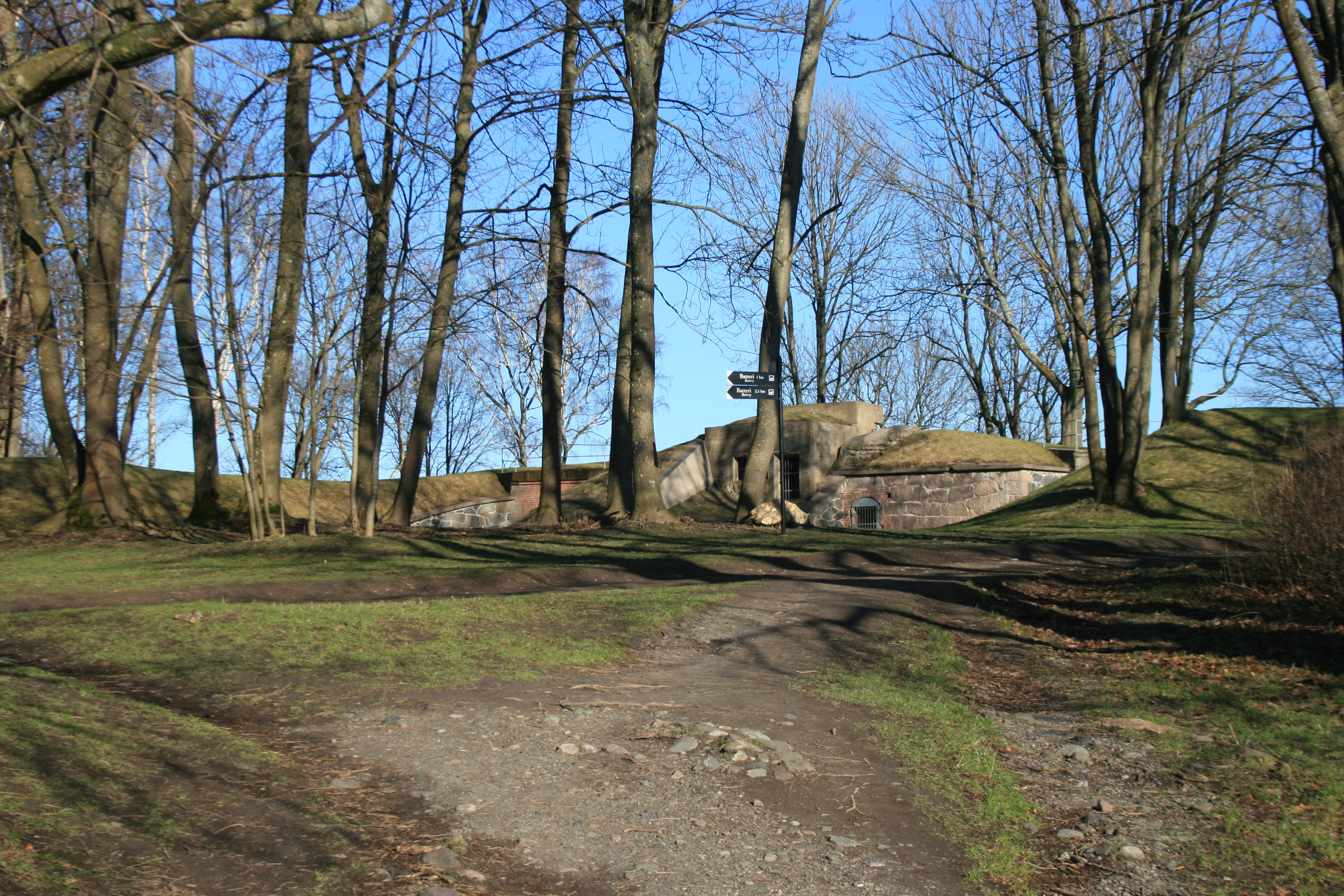 Hortenstangens batteri.